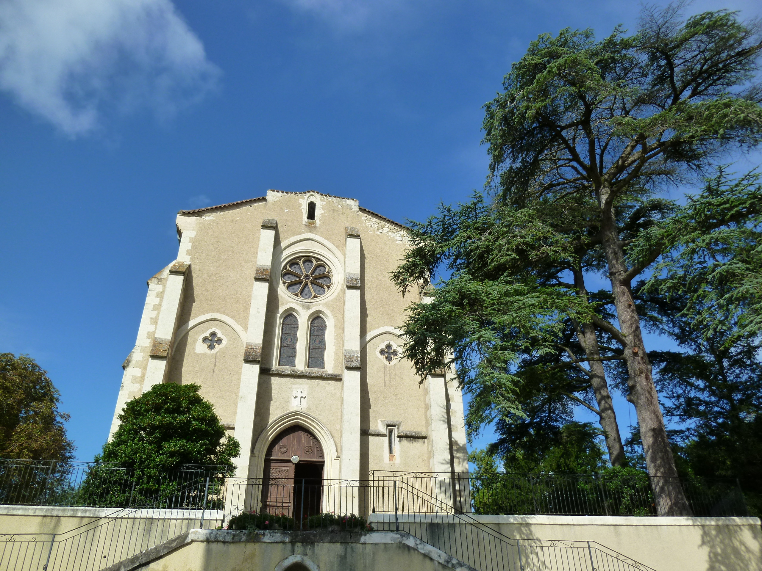 Façade de l'église Sainte Quitterie de Castelnau-Barbarens